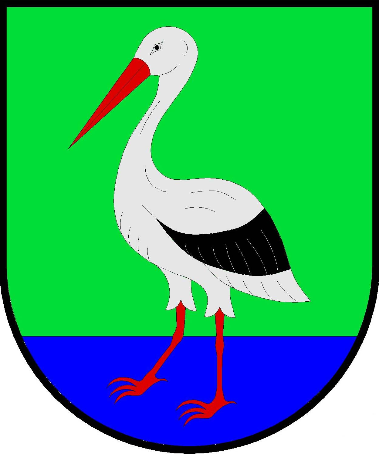 Znak obce Šestajovice (okres Náchod)